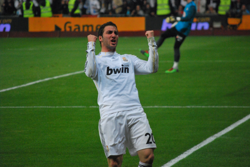 Gonzalo Higuaín celebra un gol en un derby contra el Athlético de Madrid.